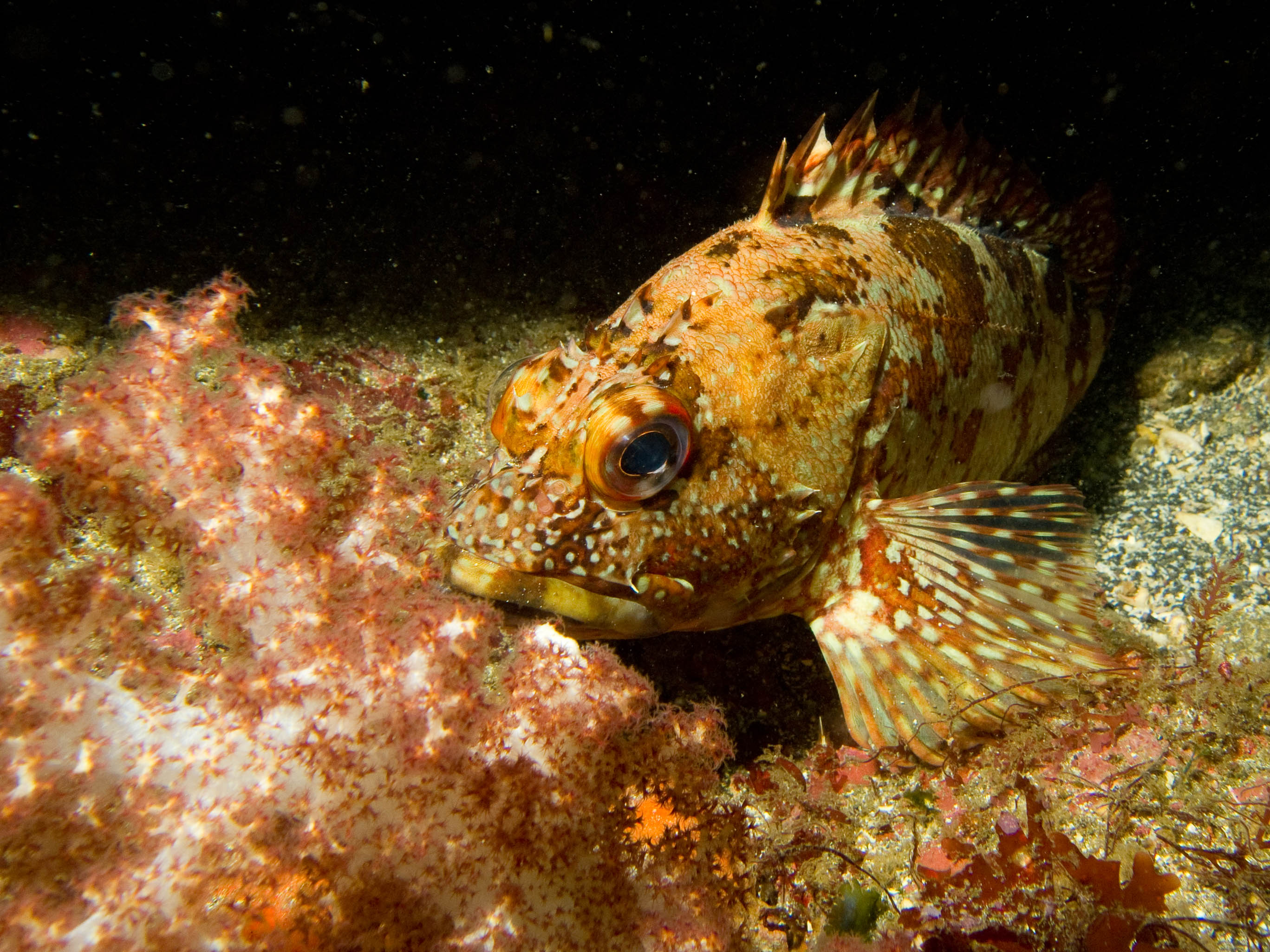 Sebastiscus marmoratus